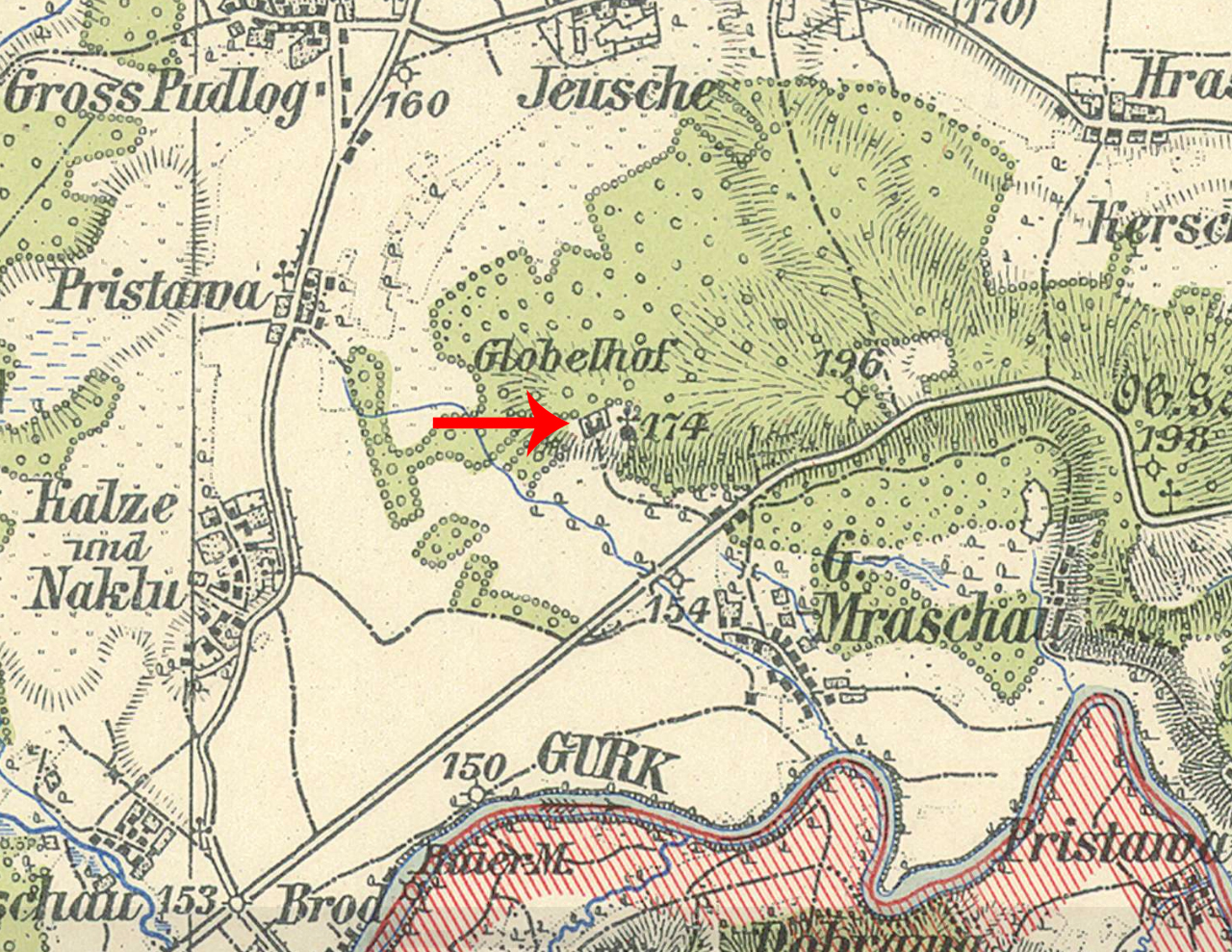 Spezialkarte der Alpen- u. Donau-Reichsgaue 1:75.000 Gurkfeld und Rann